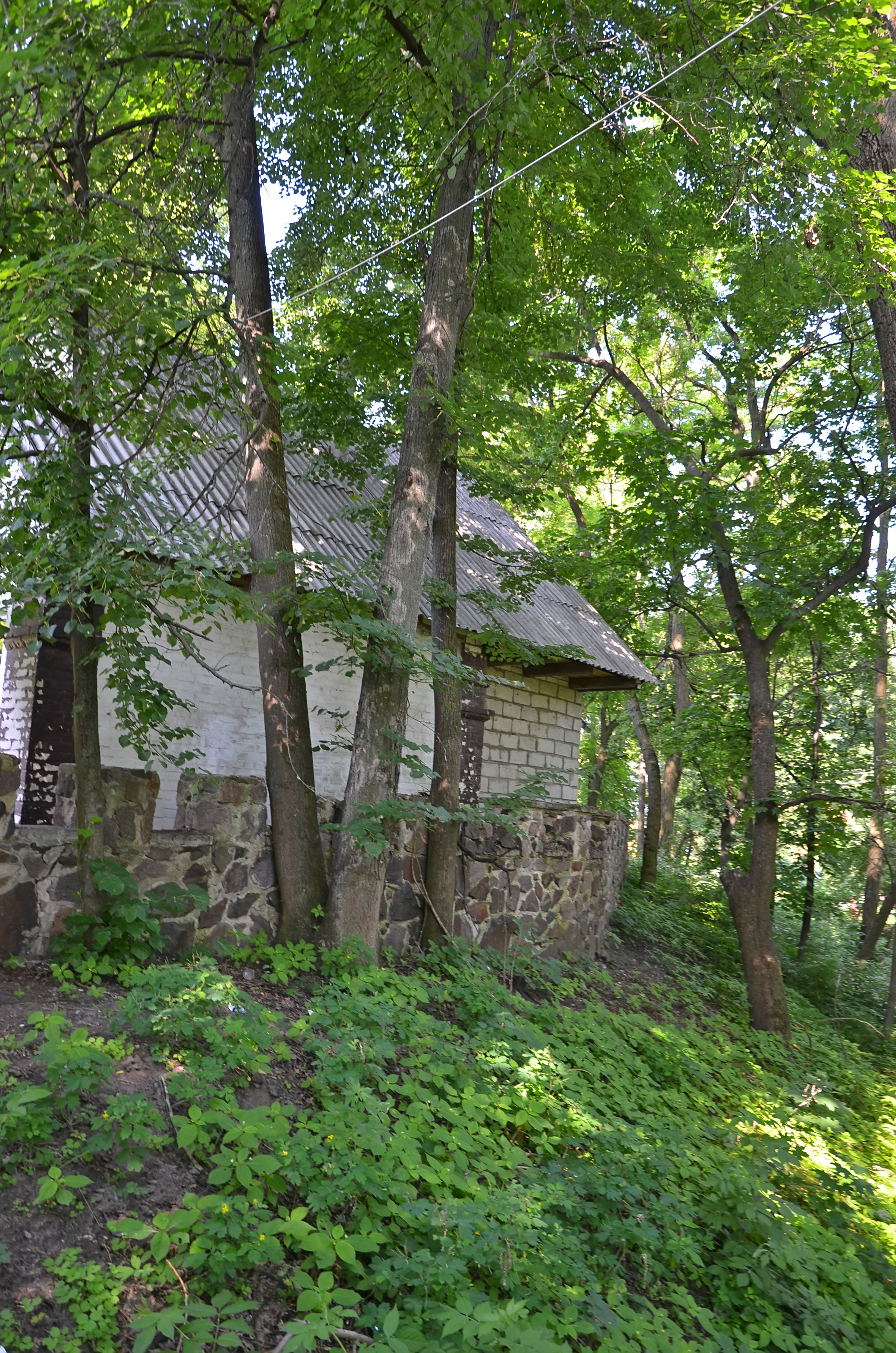 на мисі лівого берега р. Здвиж, на території смт